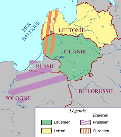 Carte de la distribution des principales langues baltes en Europe. Contents 1 Summary 2 Source 3 Statut de Copyright 4 Licensing 5 Original upload log Summary Image .jpg en 413x467 pixels à 300 pixels par pouce. Taille : 64 676 octets Source Carte réalisée par Robin Hood. Statut de Copyright Domaine public. L'auteur Robin Hood permet donc la copie et la distribution de l'image. Il préfère toutefois réaliser lui-même toute correction ou modification nécessaire qui pourrait apparaître sur Wikipédia. (voir ci-dessus les demandes de l'auteur) Catégorie:Langue balte